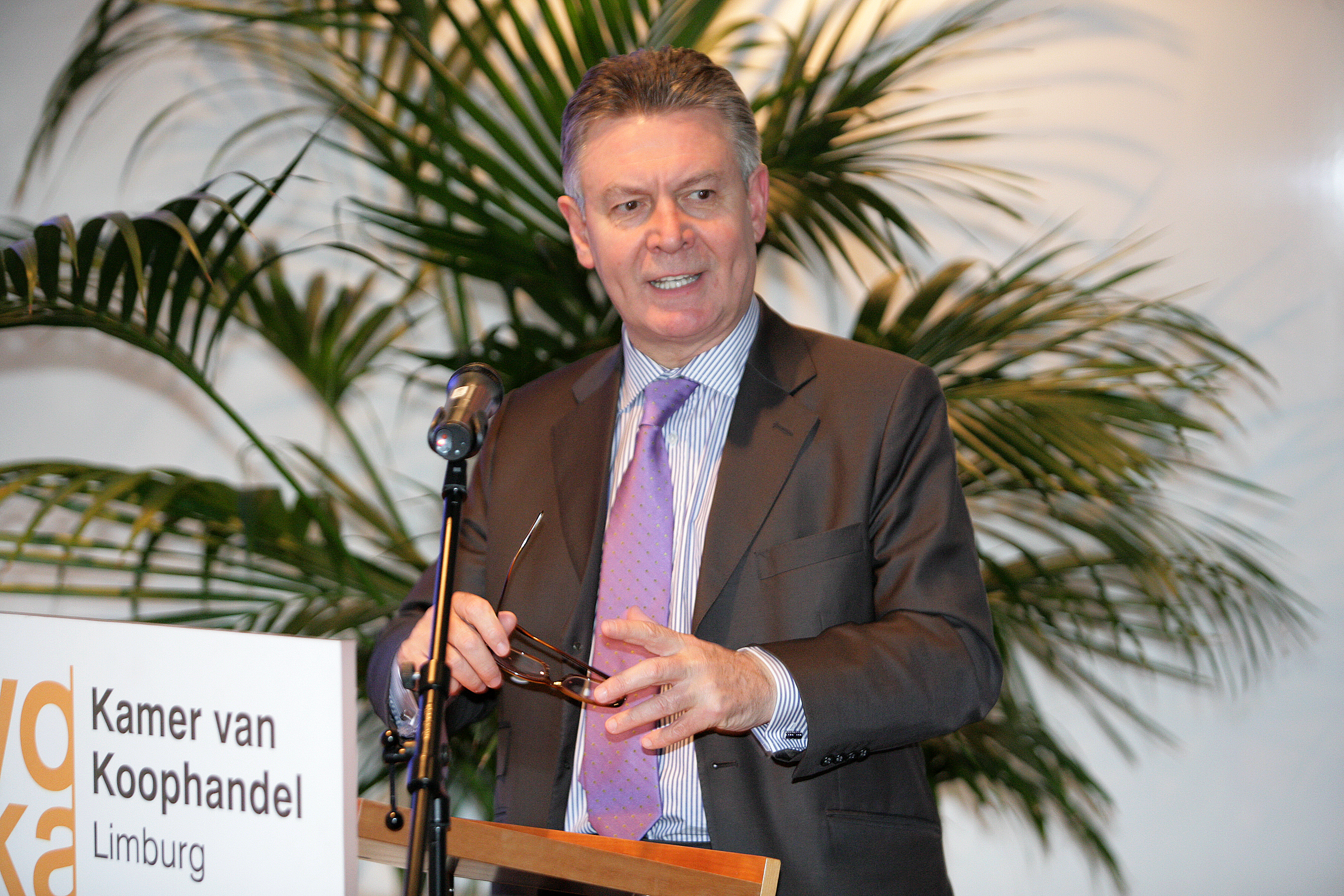 Toppolitici ontmoeten ondernemers - Karel De Gucht